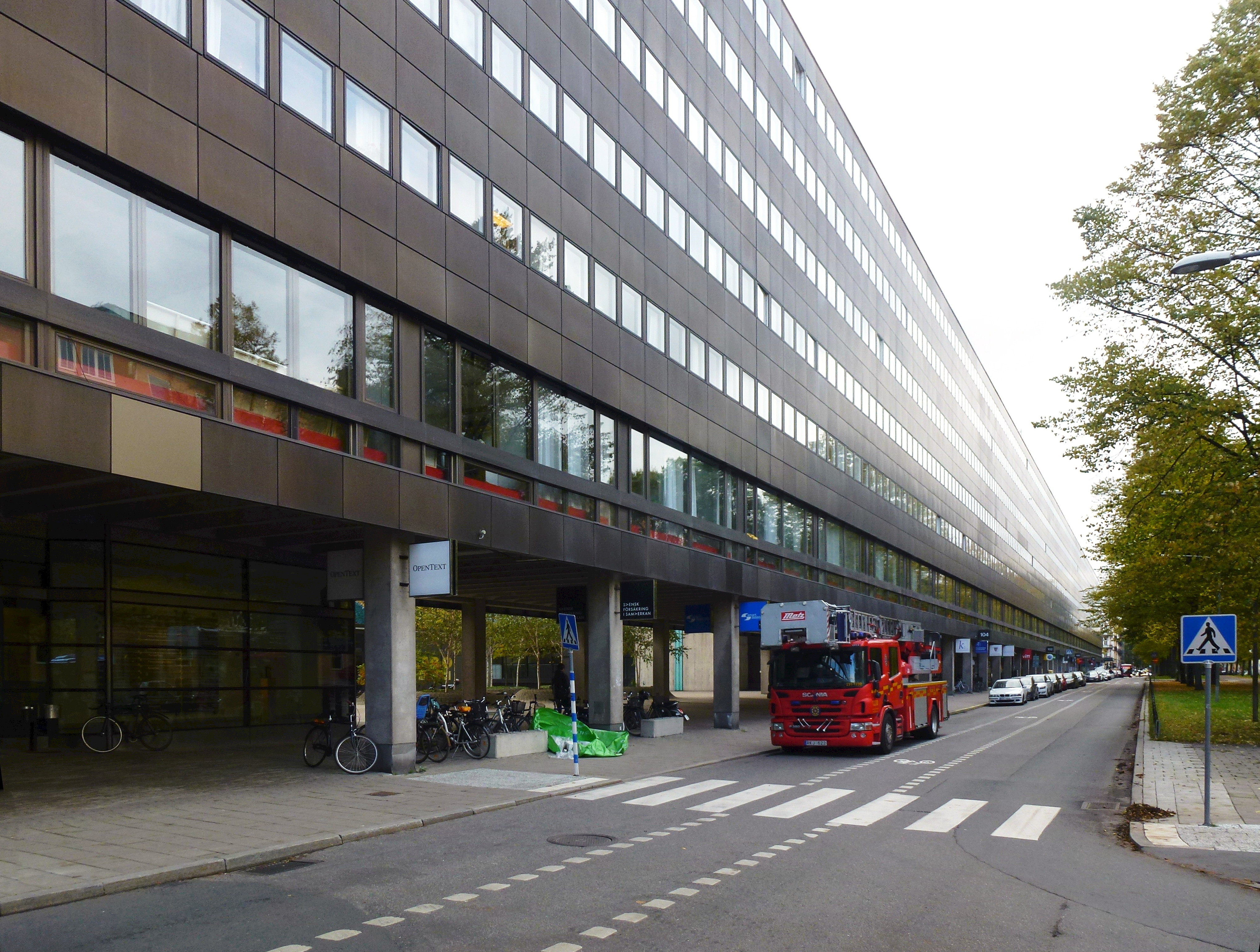 Garnisonen Karlavägen, vy mot sydost